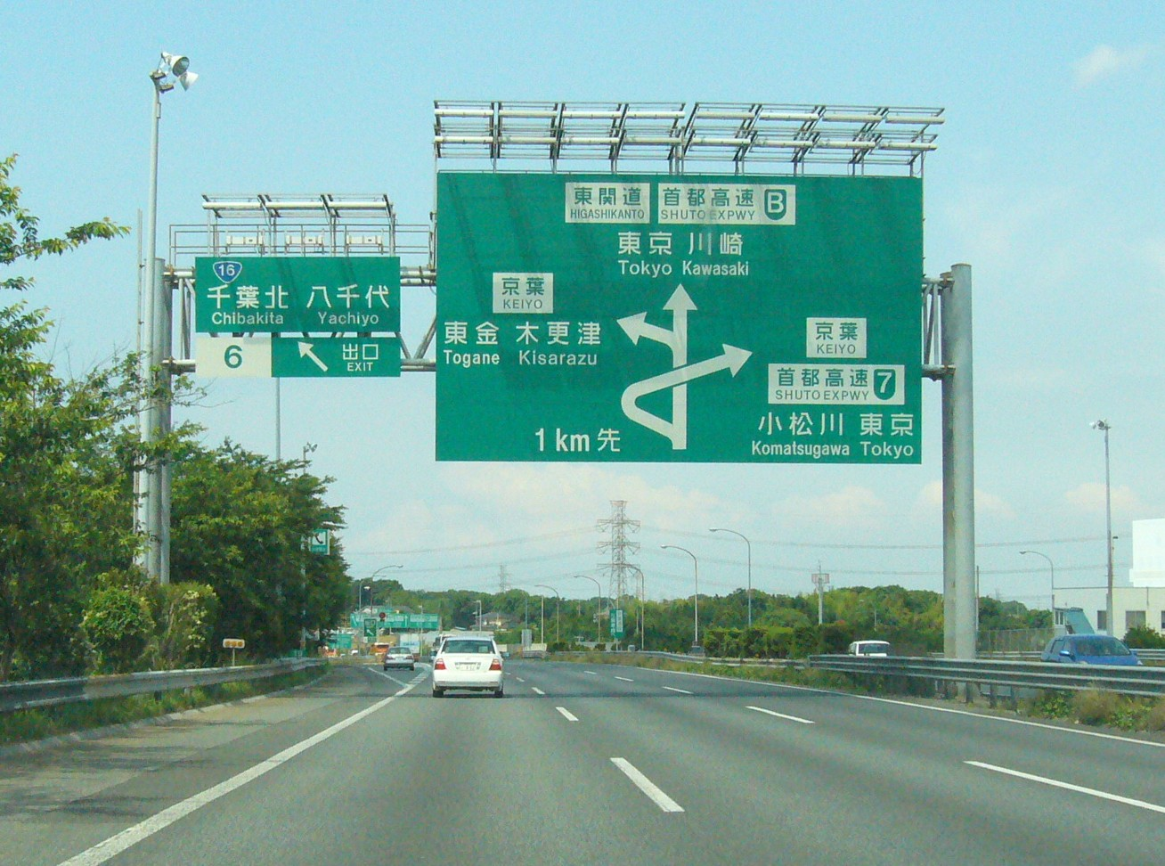 miyanogi-JCT-higashikanto-expressway,chiba-city,japan